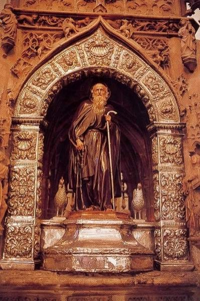 Date du cliché : septembre 2001.